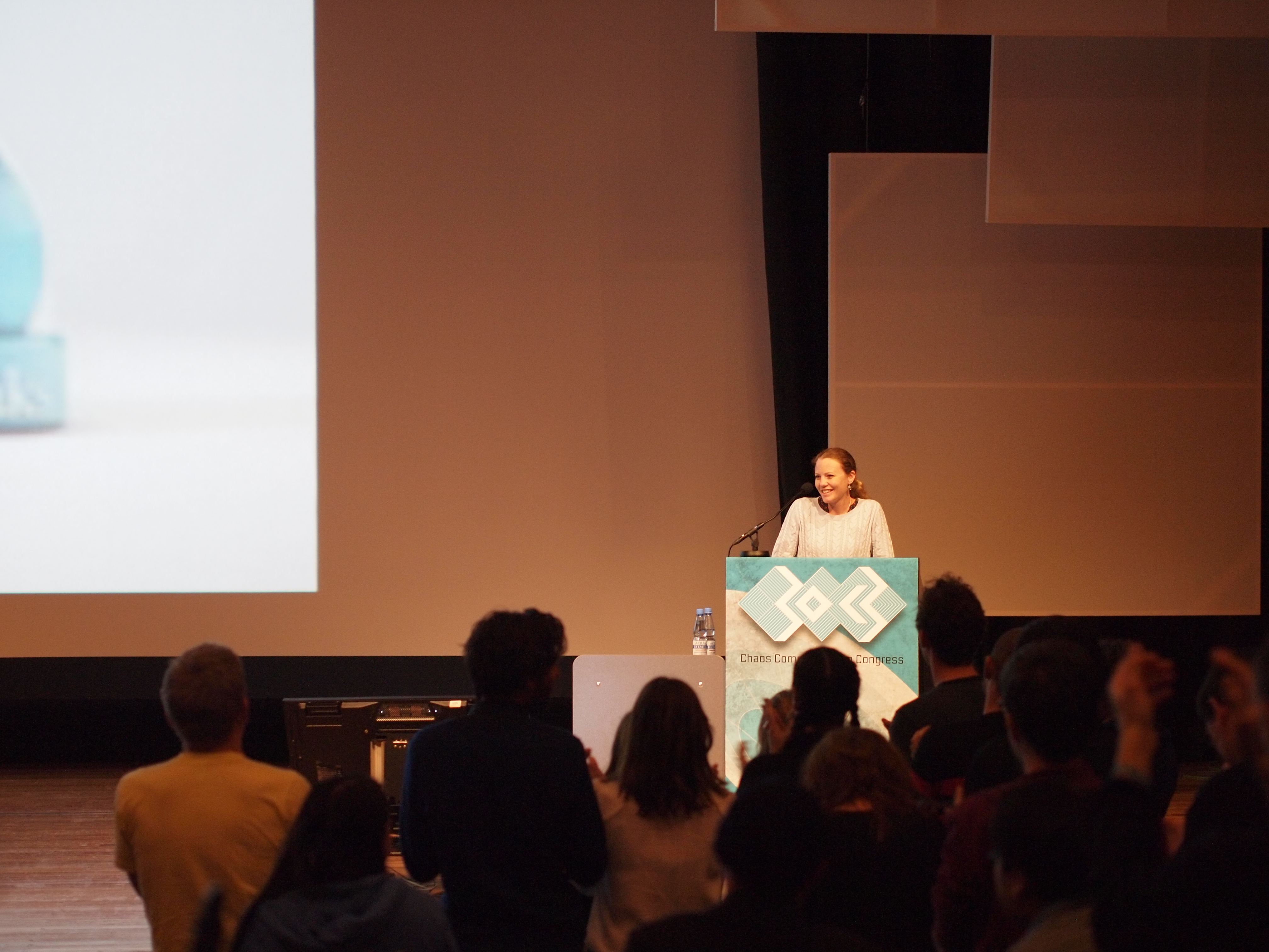 30C3: Die Wikileaks-Aktivistin und Journalistin Sarah Harrison